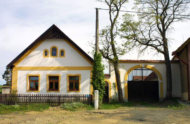 Chalupa v Černíkovicích